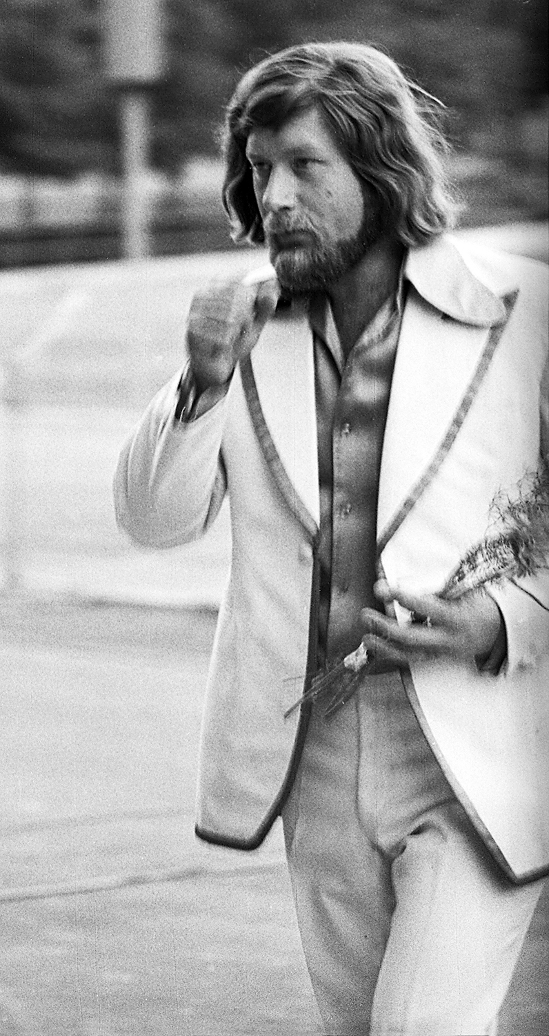 Vello Orumets 75